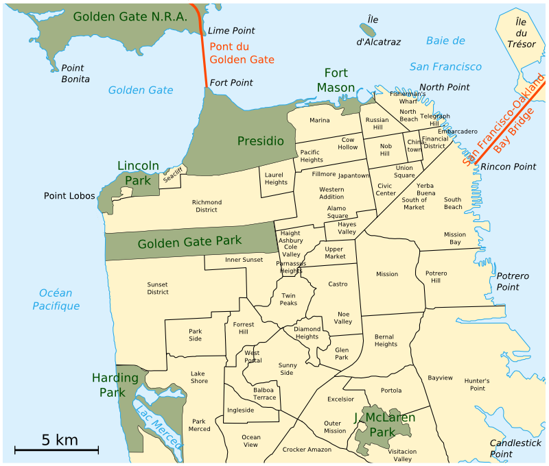 Quartiers de San Francisco